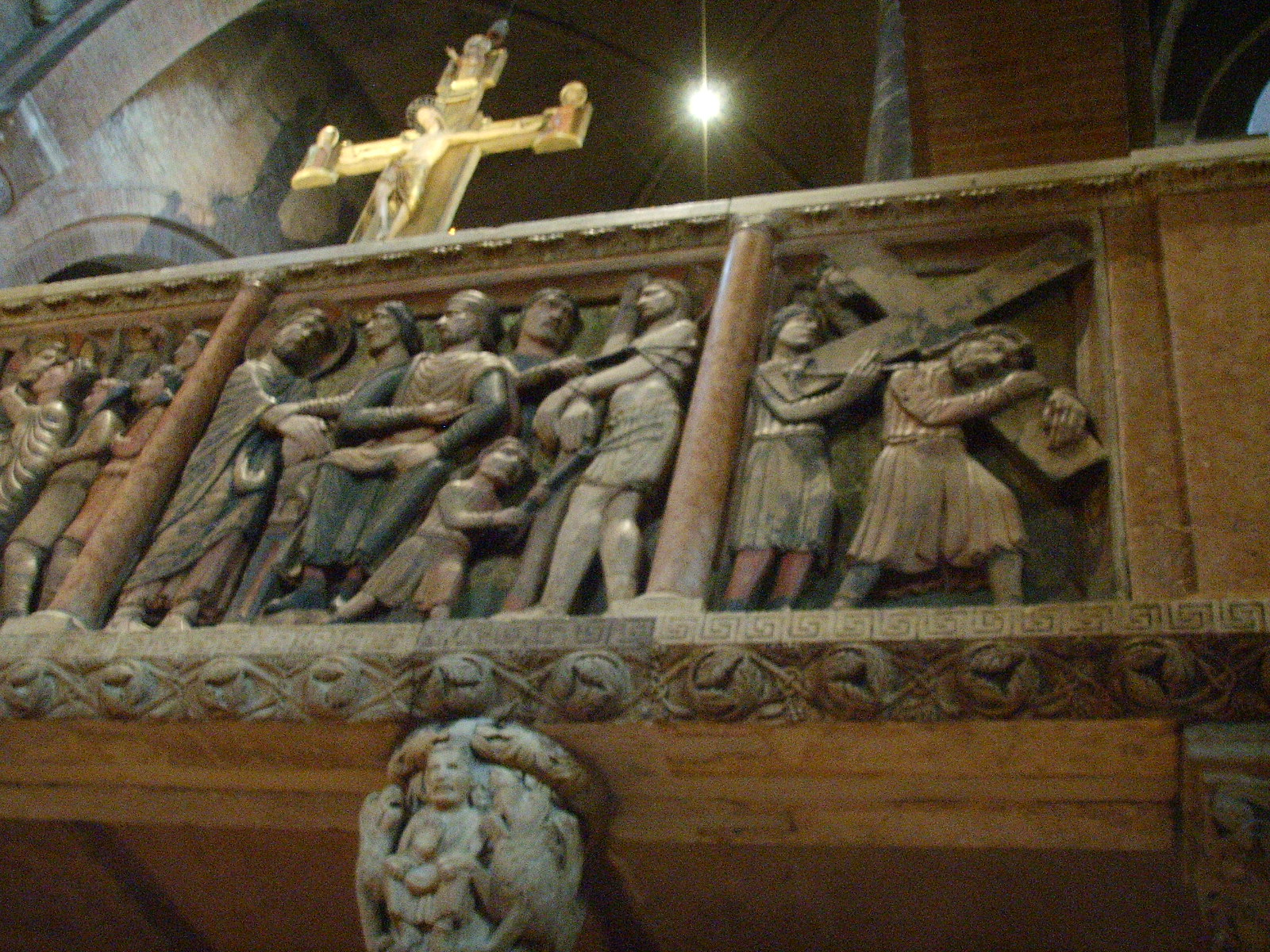 duomo di modena